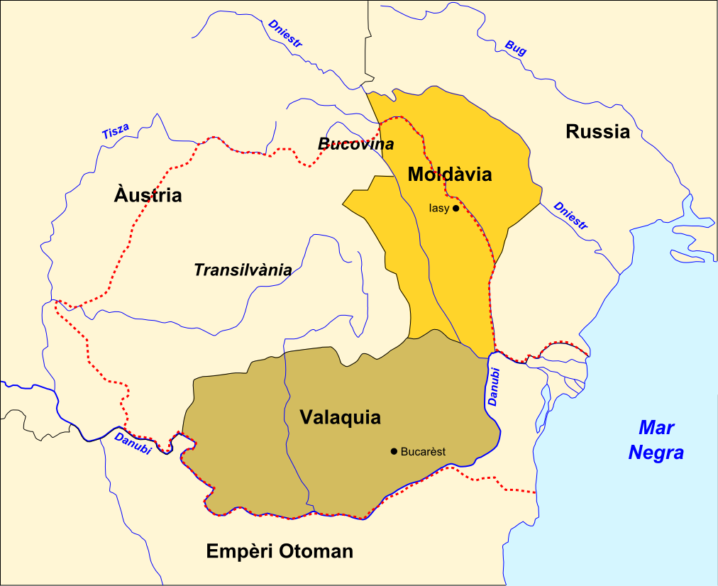 Principats de Valaquia e de Moldàvia en 1815.